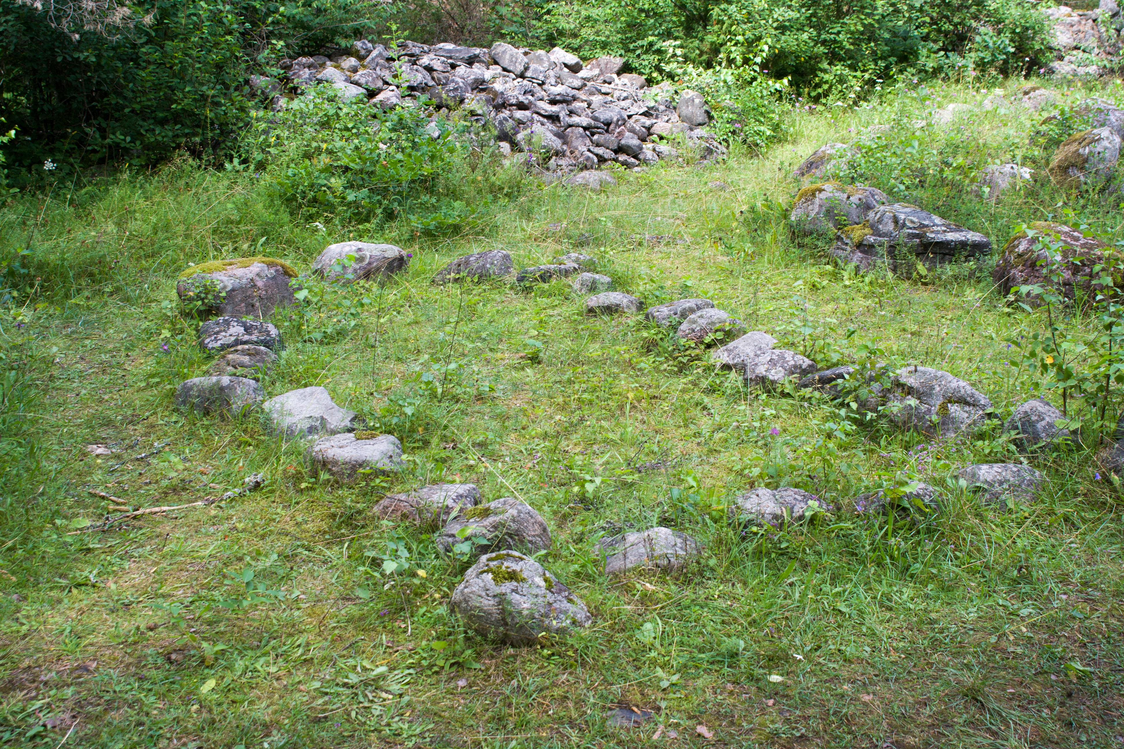 Kivikalme "Ussimätas", "Ussimägi"